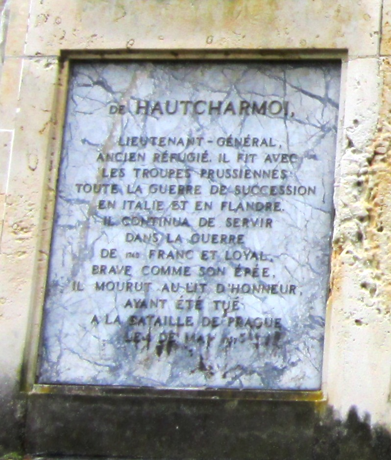 Ehrentafel für Heinrich Karl Ludwig Herault de Hautcharmoy (1689-1757) am Obelisken in Rheinsberg